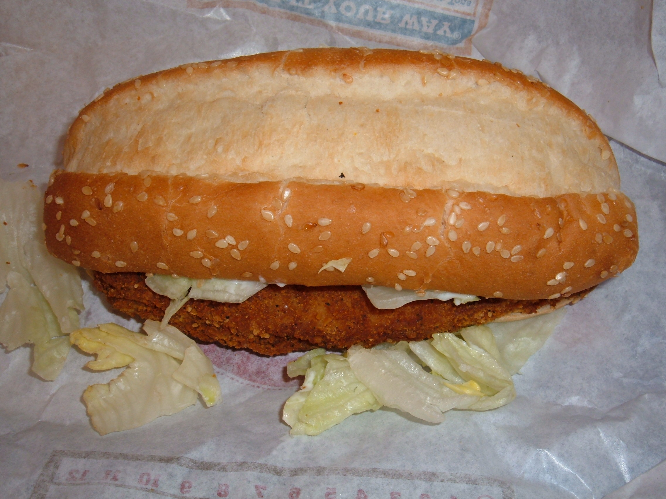 A Burger King Original Chicken Sandwich.